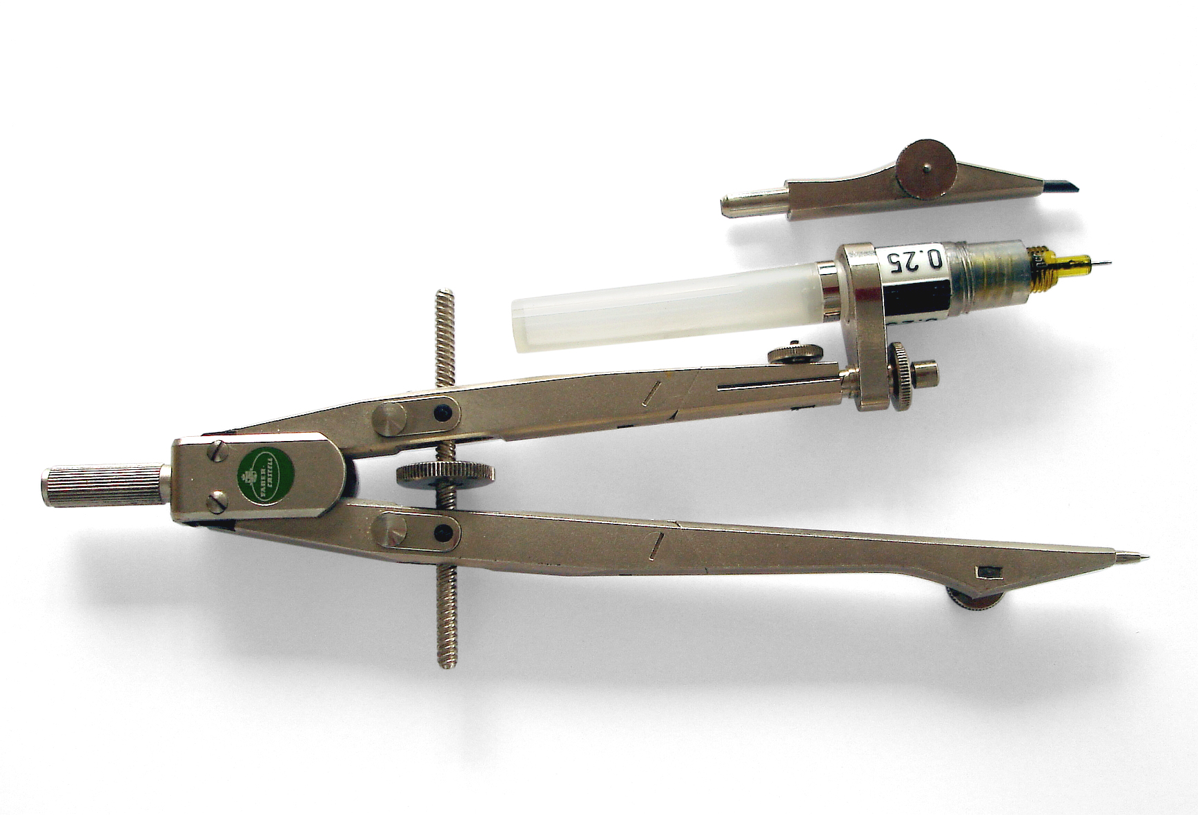 Tuschefüller und Zirkel montiert, Hersteller: Zirkel Faber Castell, Füller nur mit Aufdruck Castell. Dieses Schreibgerät war nachfüllbar und hatte keine auswechselbare Tuschepatrone.